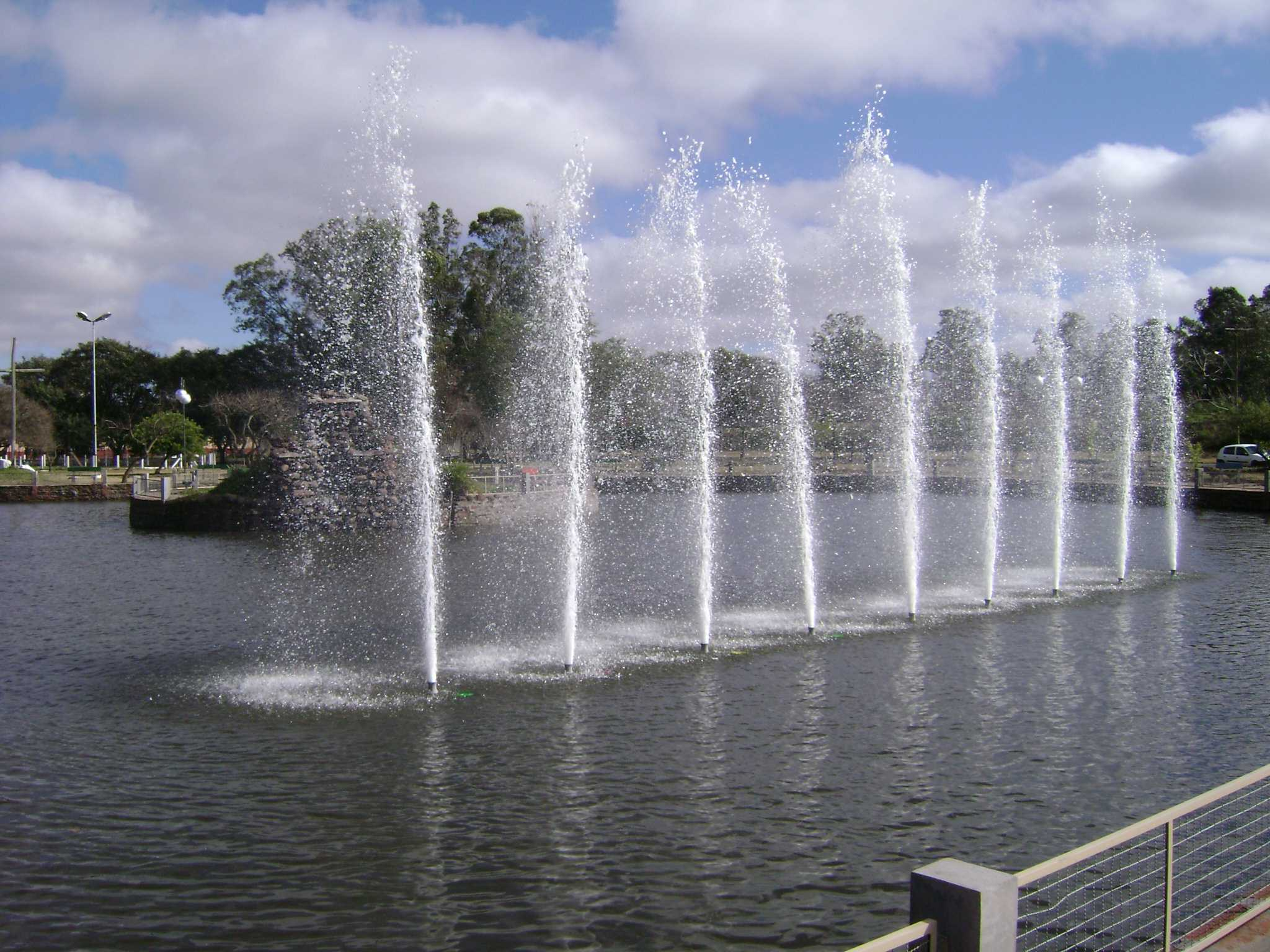 Chafariz da Lagoa do Parque Neytha Ramos, em Alegrete, Rio Grande do Sul